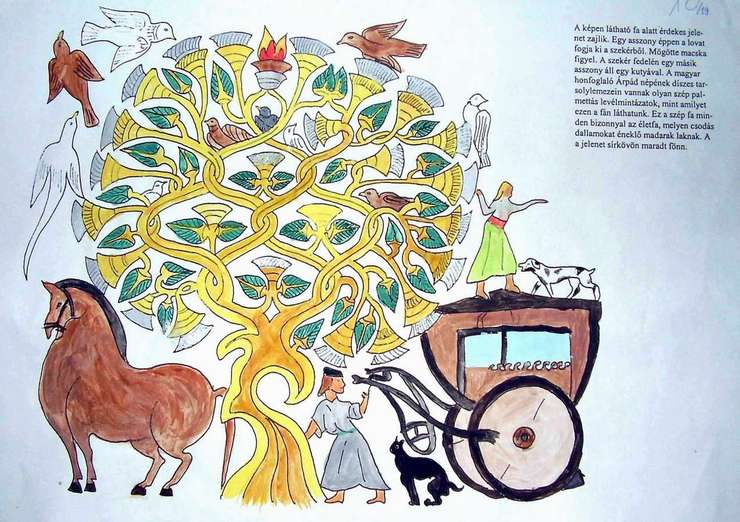 Egy régi kínai sírkőfaragás rajza az Ősi kínai művészetek című füzetből.